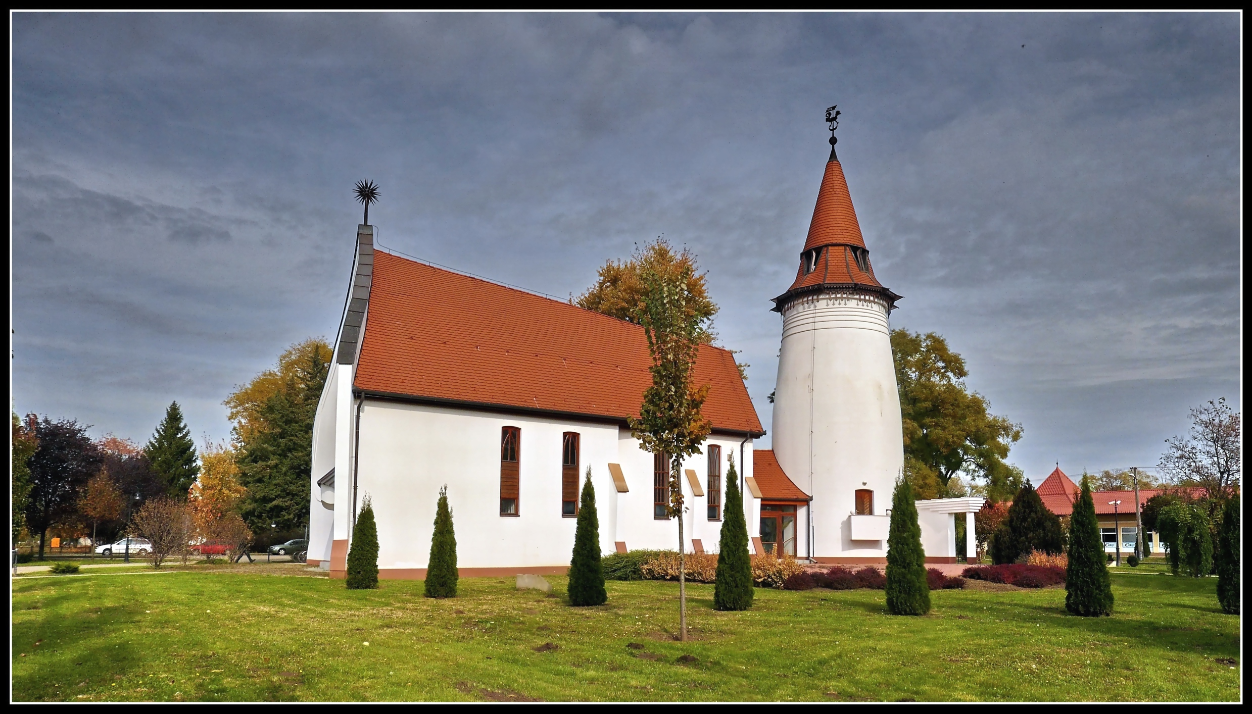 Ebes ReformátusTemploma Délnyugatról